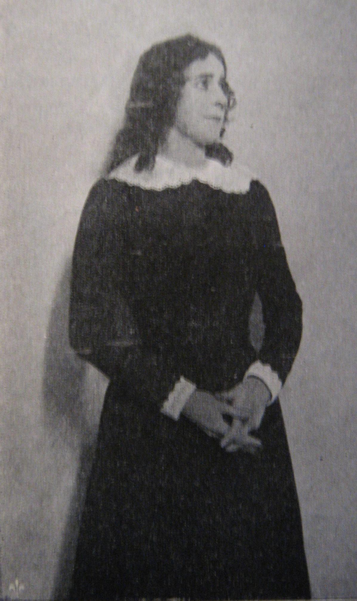 Georgina Barcklind, ur Varia 1902